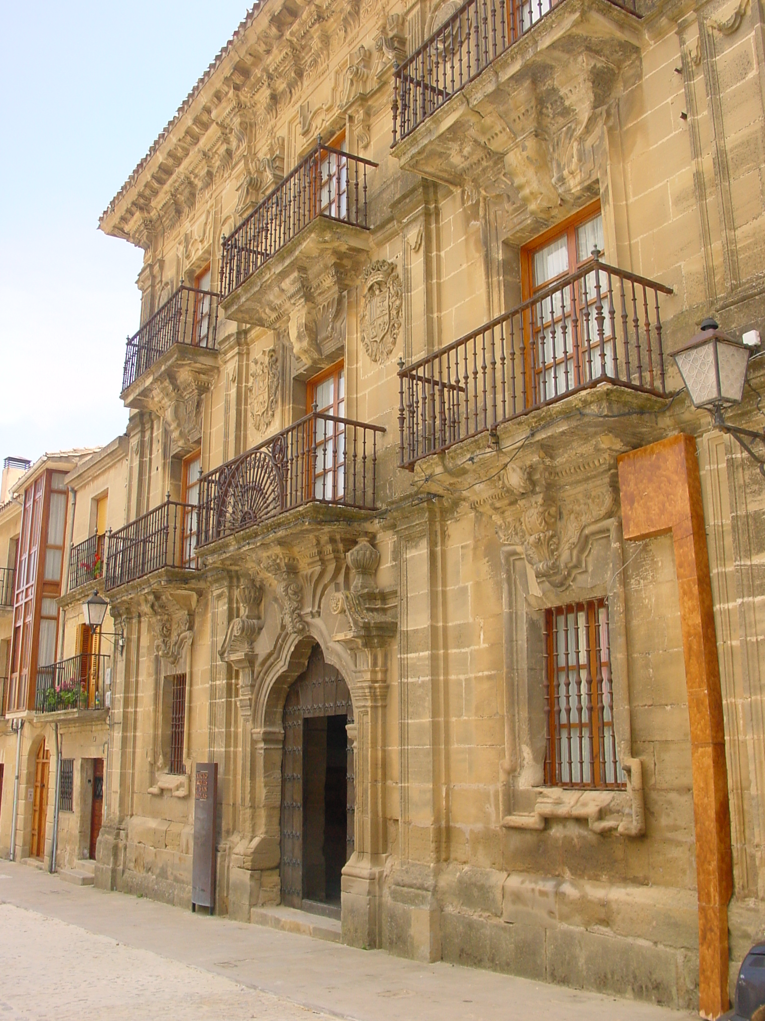 Briones, La Rioja (España). Palacio de los marqueses de San Nicolás actual sede del Ayuntamiento.